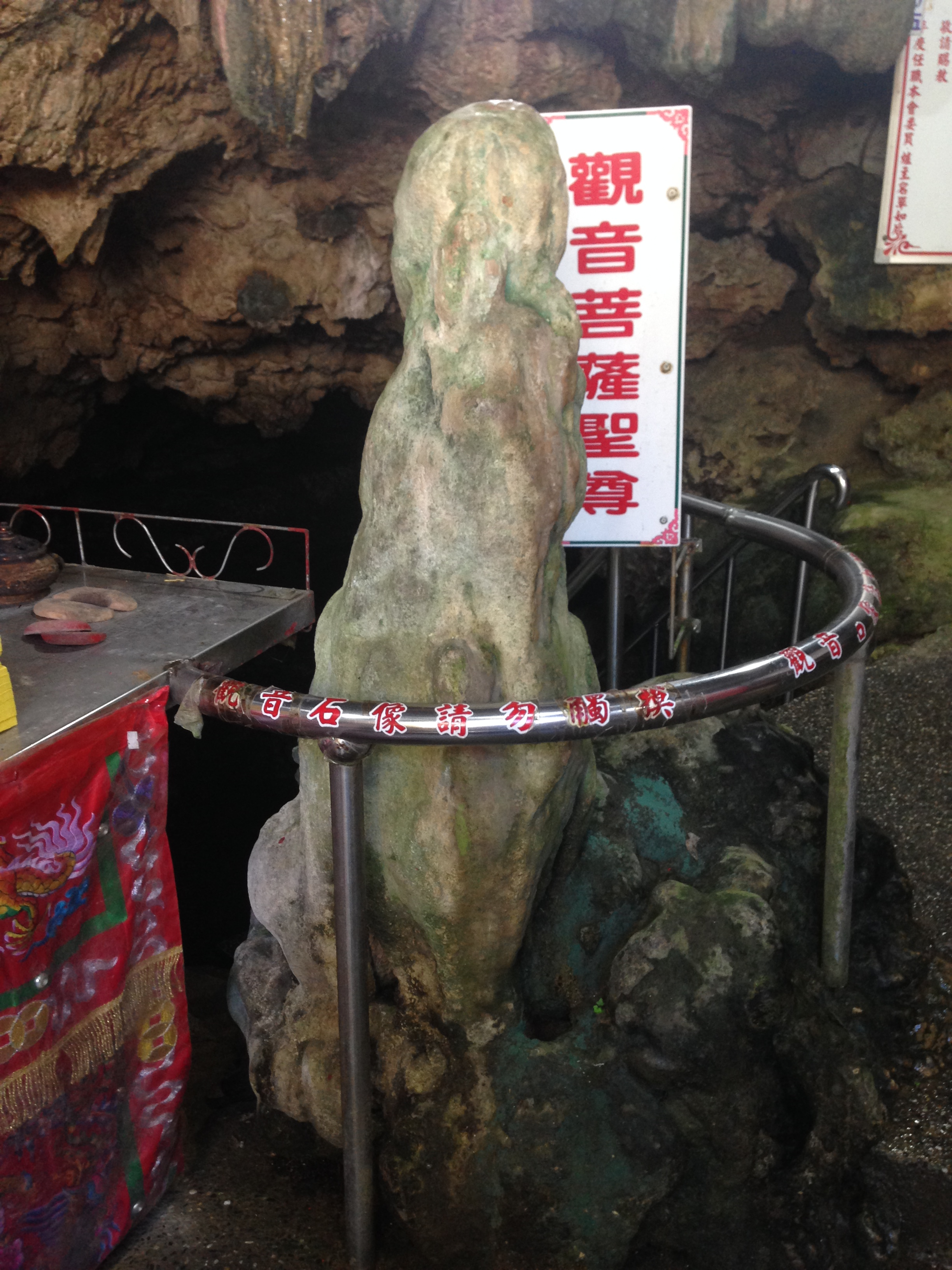 綠島觀音洞